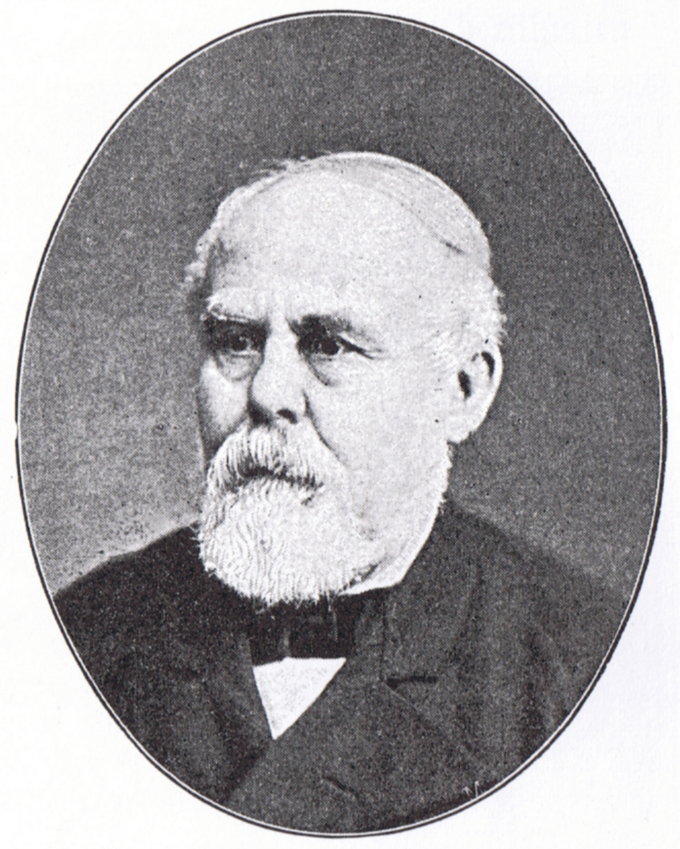 Ludwig Gurlitt (1855–1931), deutscher Pädagoge